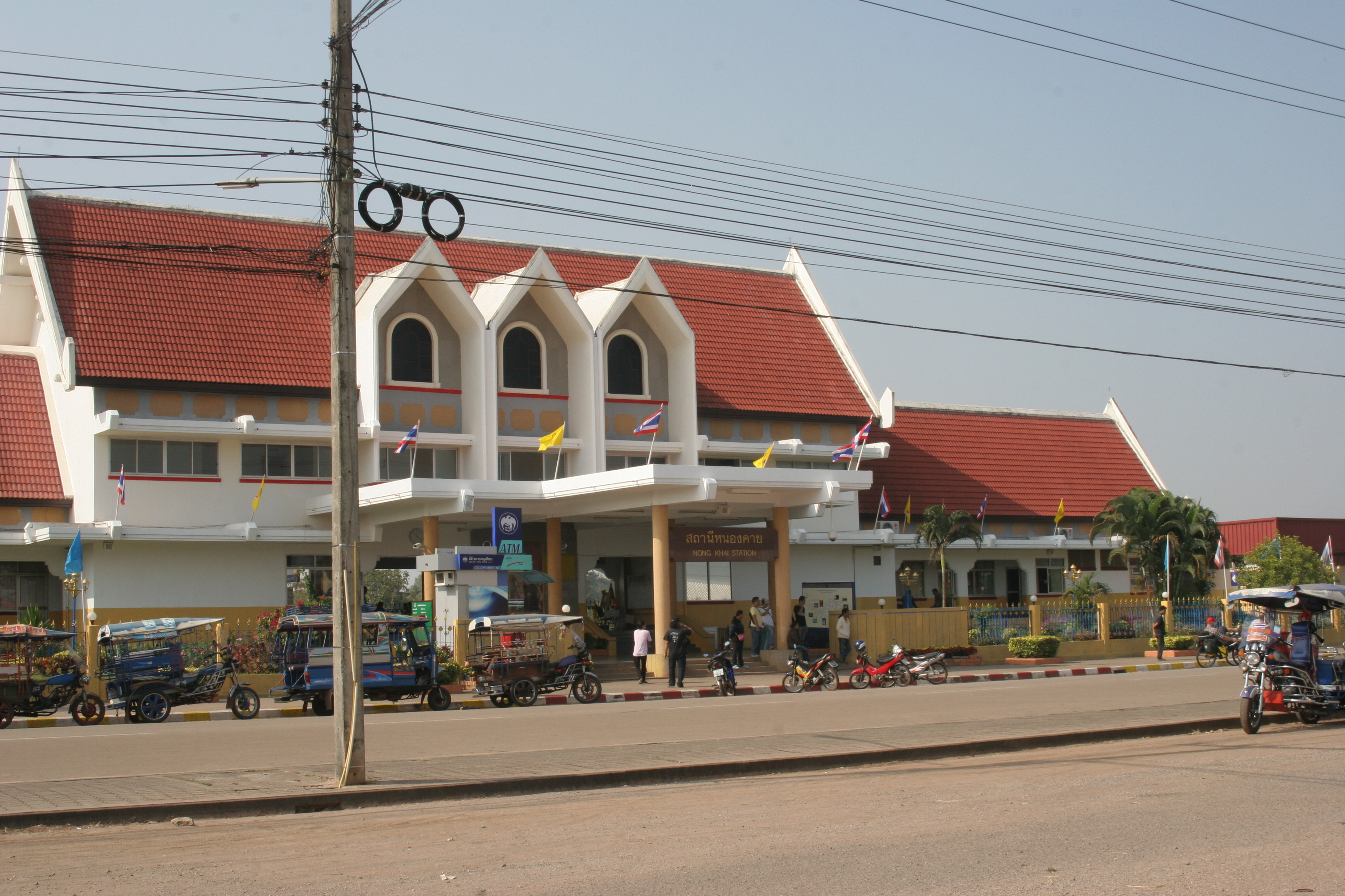 ノーンカーイ駅